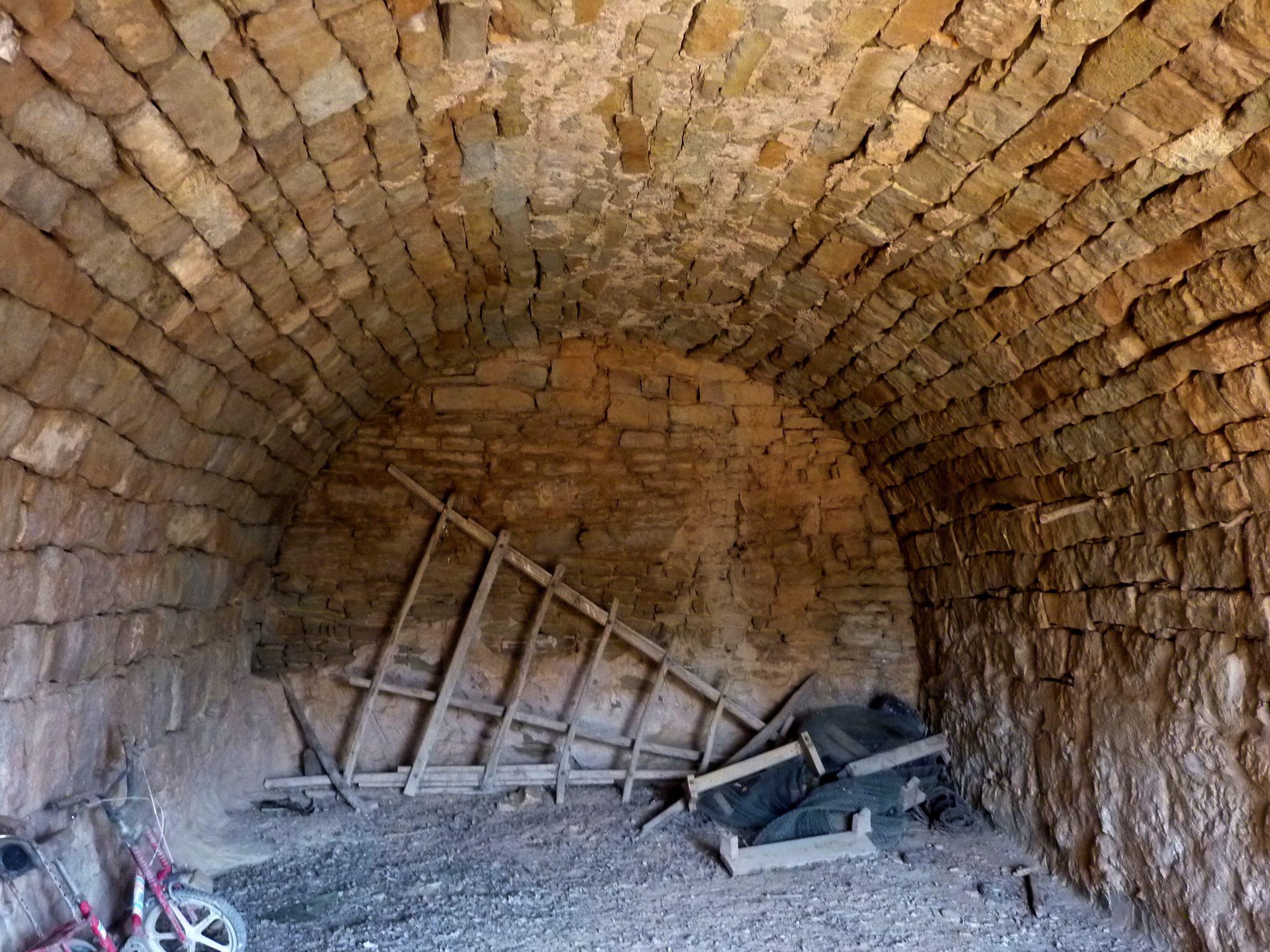 La Bardissa de Palou (Torrefeta i Florejacs): interior de la cabana de volta